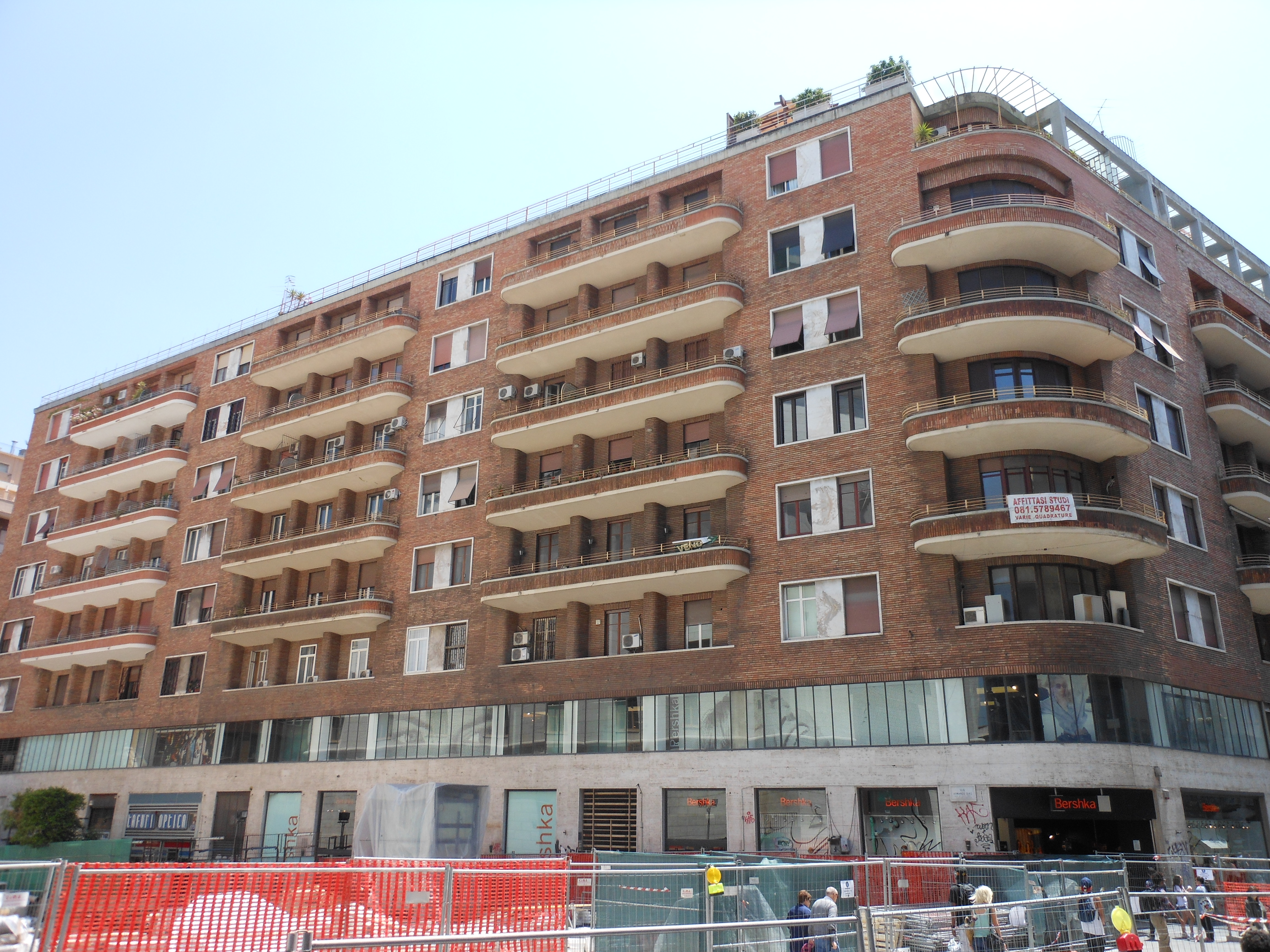 Palazzo Fernandez (opera di Ferdinando Chiaromonte) in via Armando Diaz a Napoli